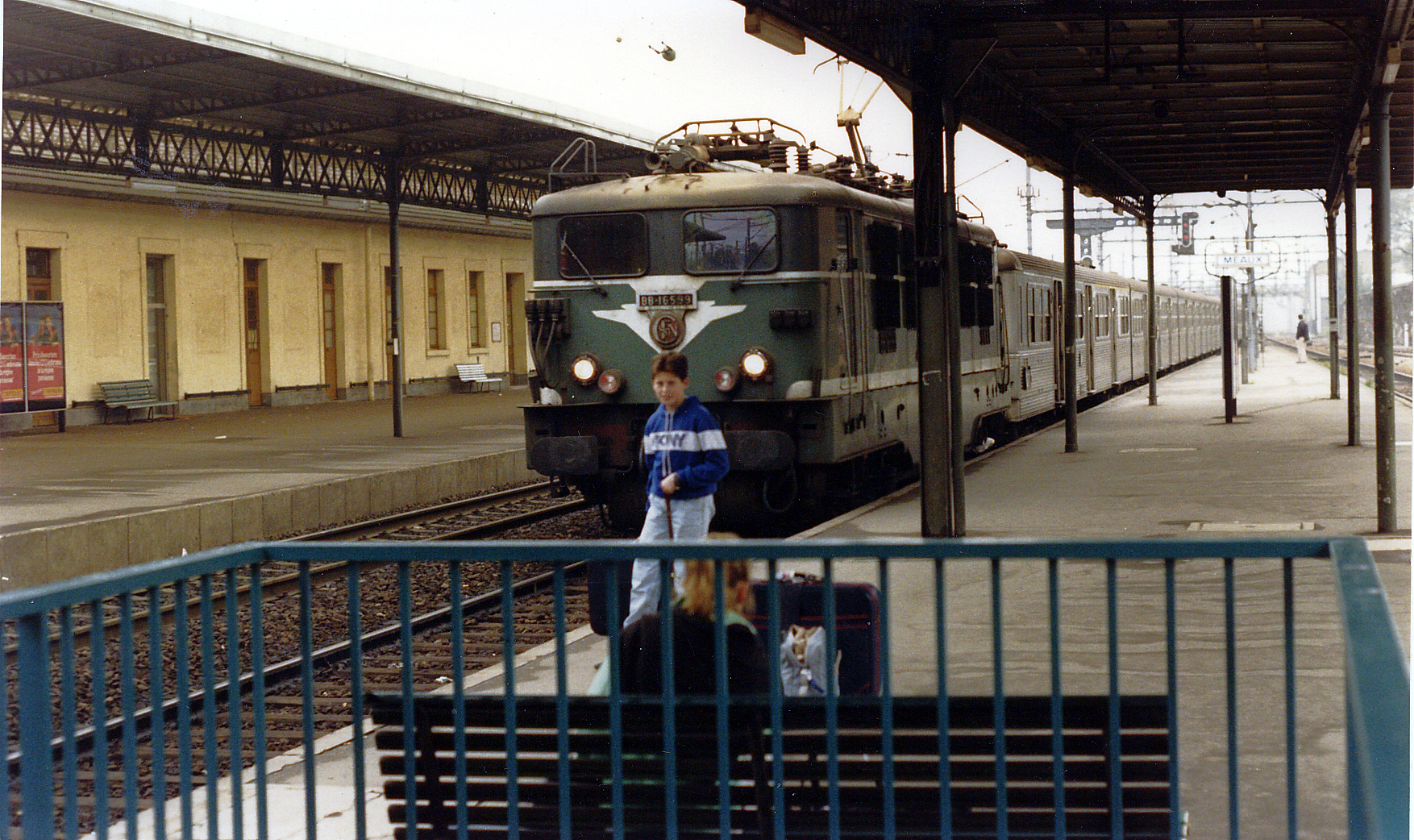 Meaux Station in 1987.